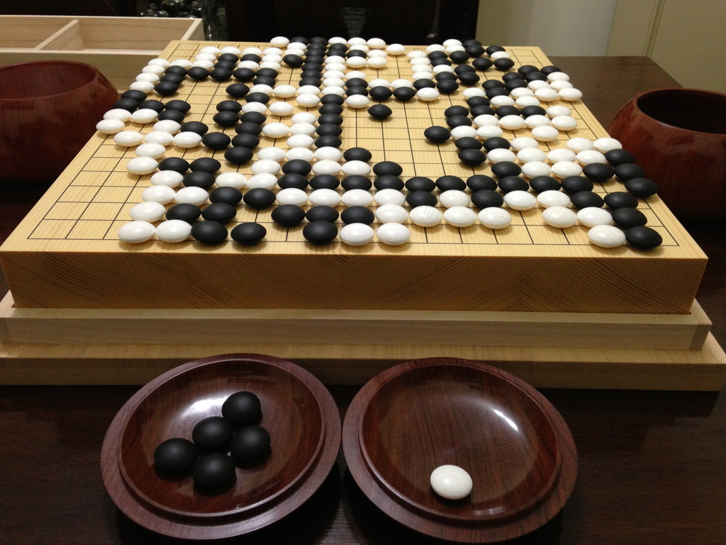 Plateau du jeu Go